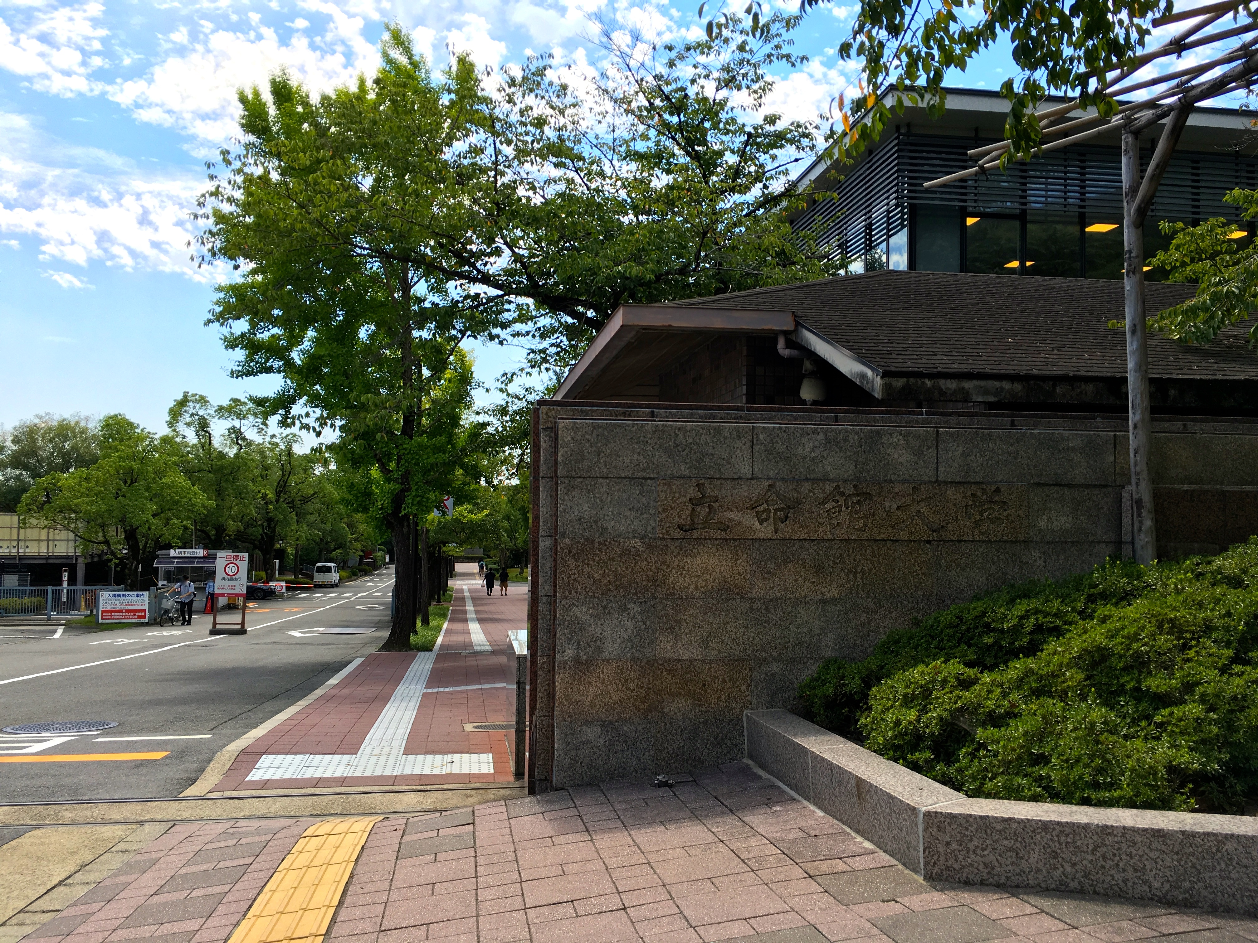 The photo was taken by me on September 10, 2016.